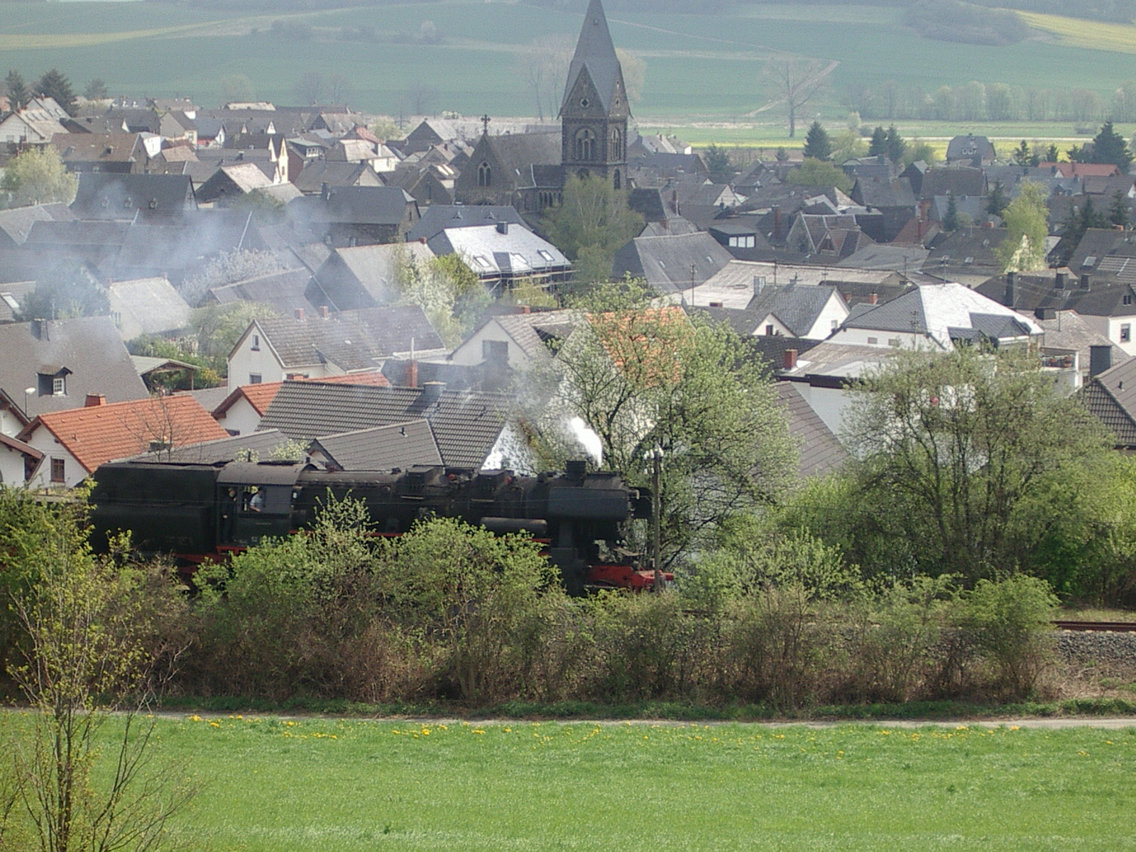 Thür mit Bahnstrecke